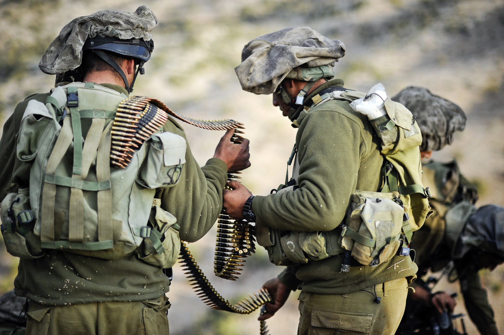 November 18, 2010. Soldiers from the Granite Battalion of the Nachal Brigade conclude a military exercise during which they practiced different scenarios, thus maintaining readiness in all fronts. היום הסתיים תרגיל של גדוד גרניט בחטיבת הנח"ל, במסגרתו אומנו הכוחות ותרגלו תרחישים שונים על מנת לשמר את מוכנותם בגזרות השונות.